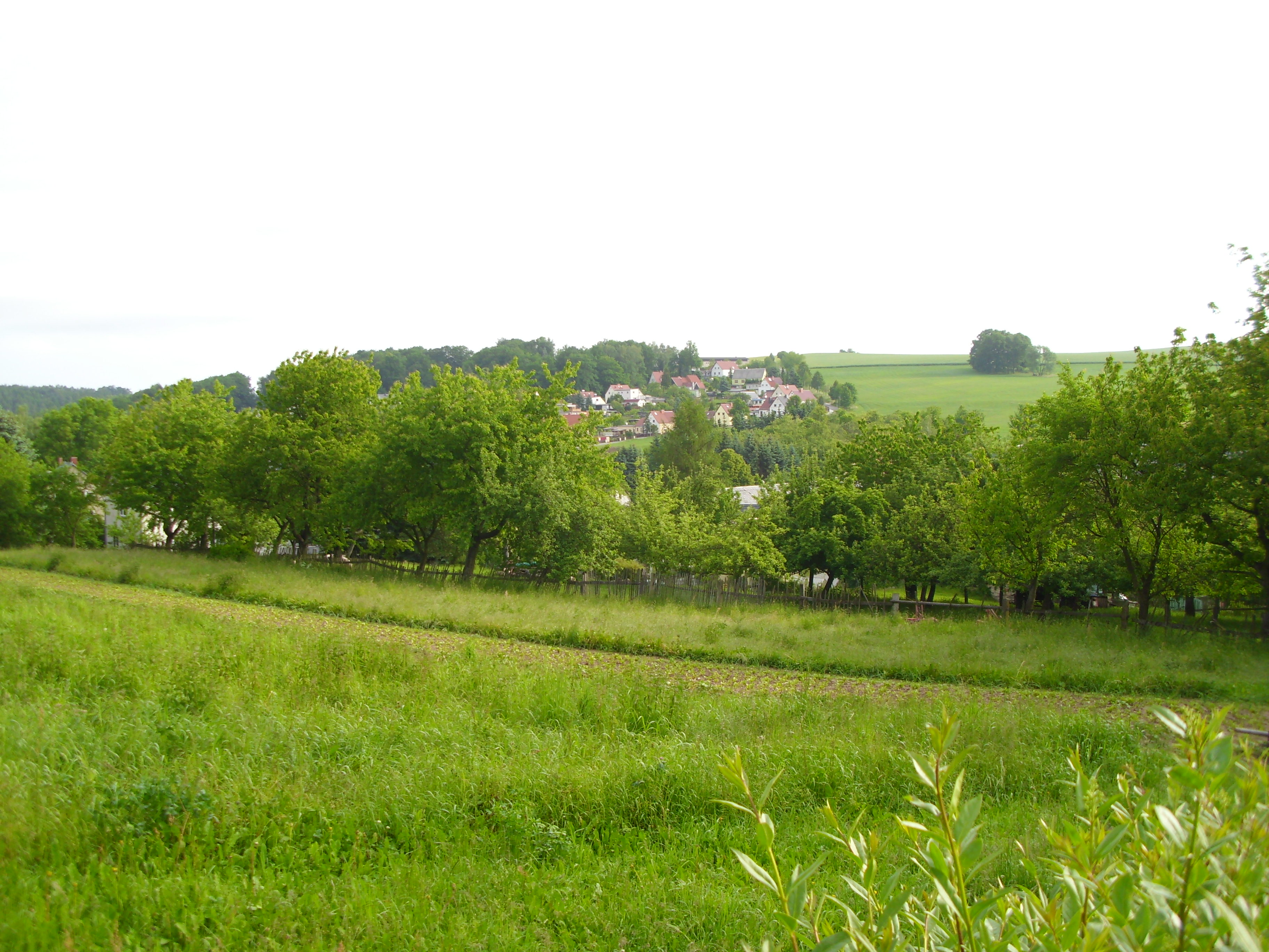 Blick vom Friedhof Oelsa zum Niederdorf mit der Wilmsdorfer Straße vom Oelsa